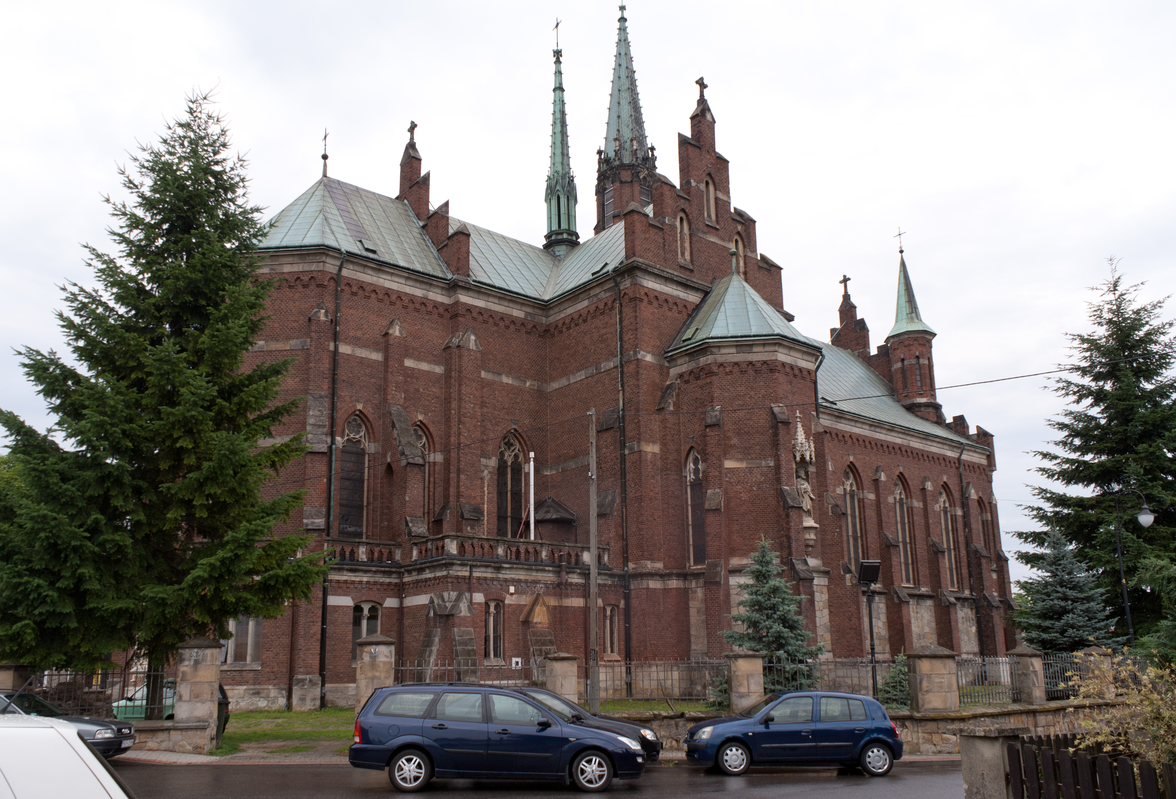 Kościół parafialny pw. Najświętszej Maryi Panny Królowej Polski w Korczynie